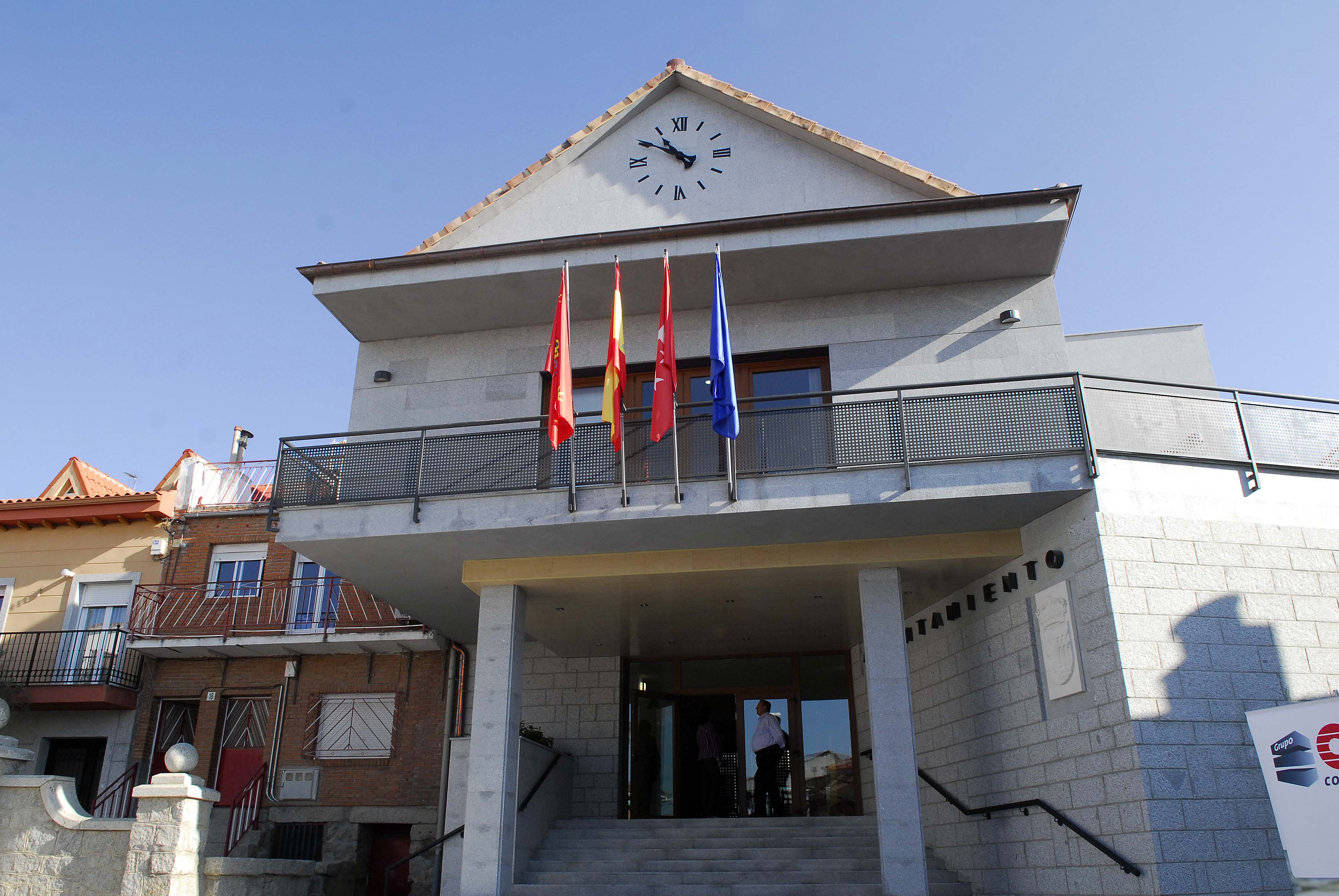 imagen del ayuntamiento actual de Fresnedillas